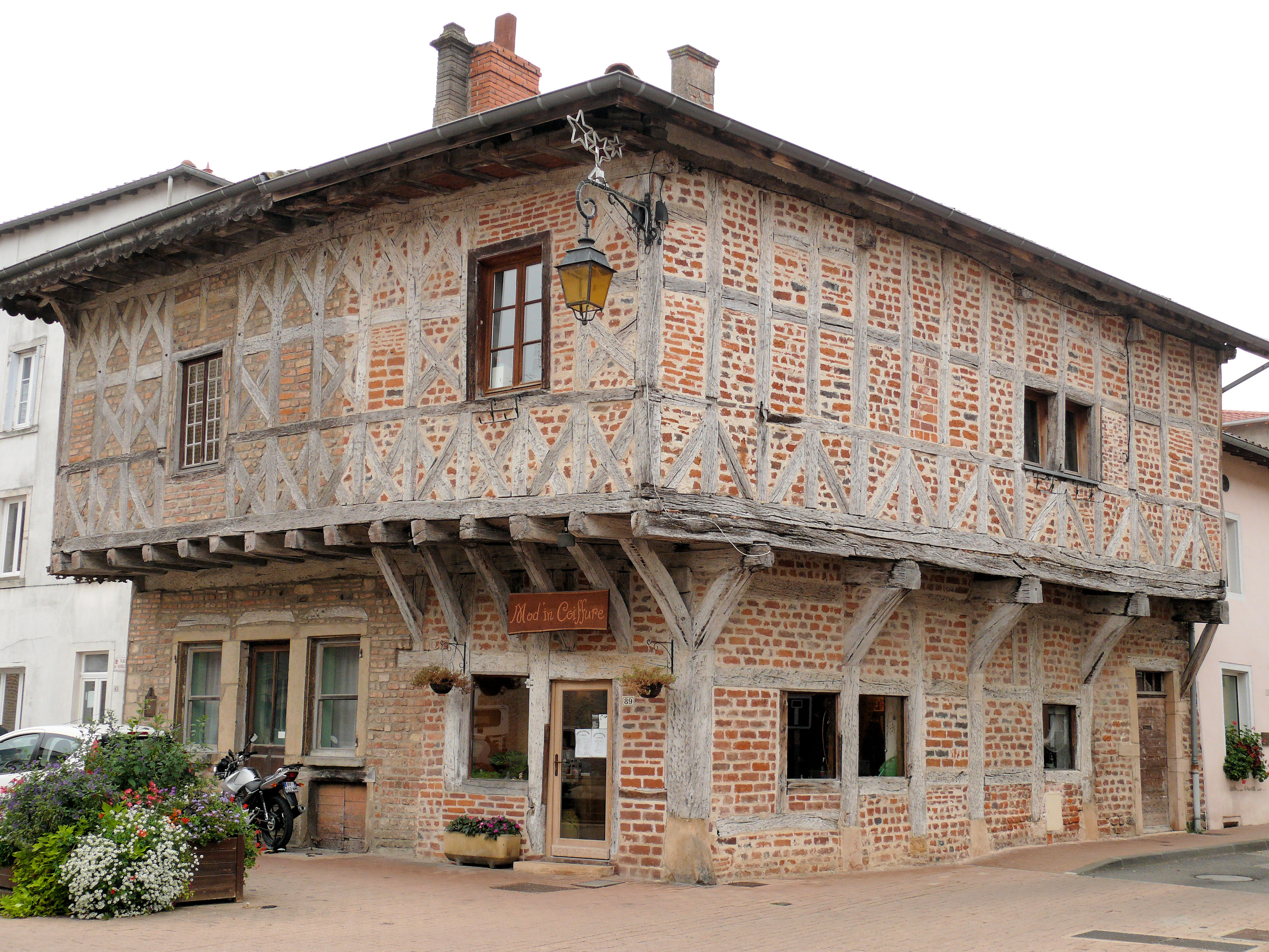 Saint-Trivier-sur-Moignans - Maison à colombage